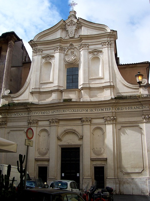 Roma - Chiesa di S. Paolo alla Regola